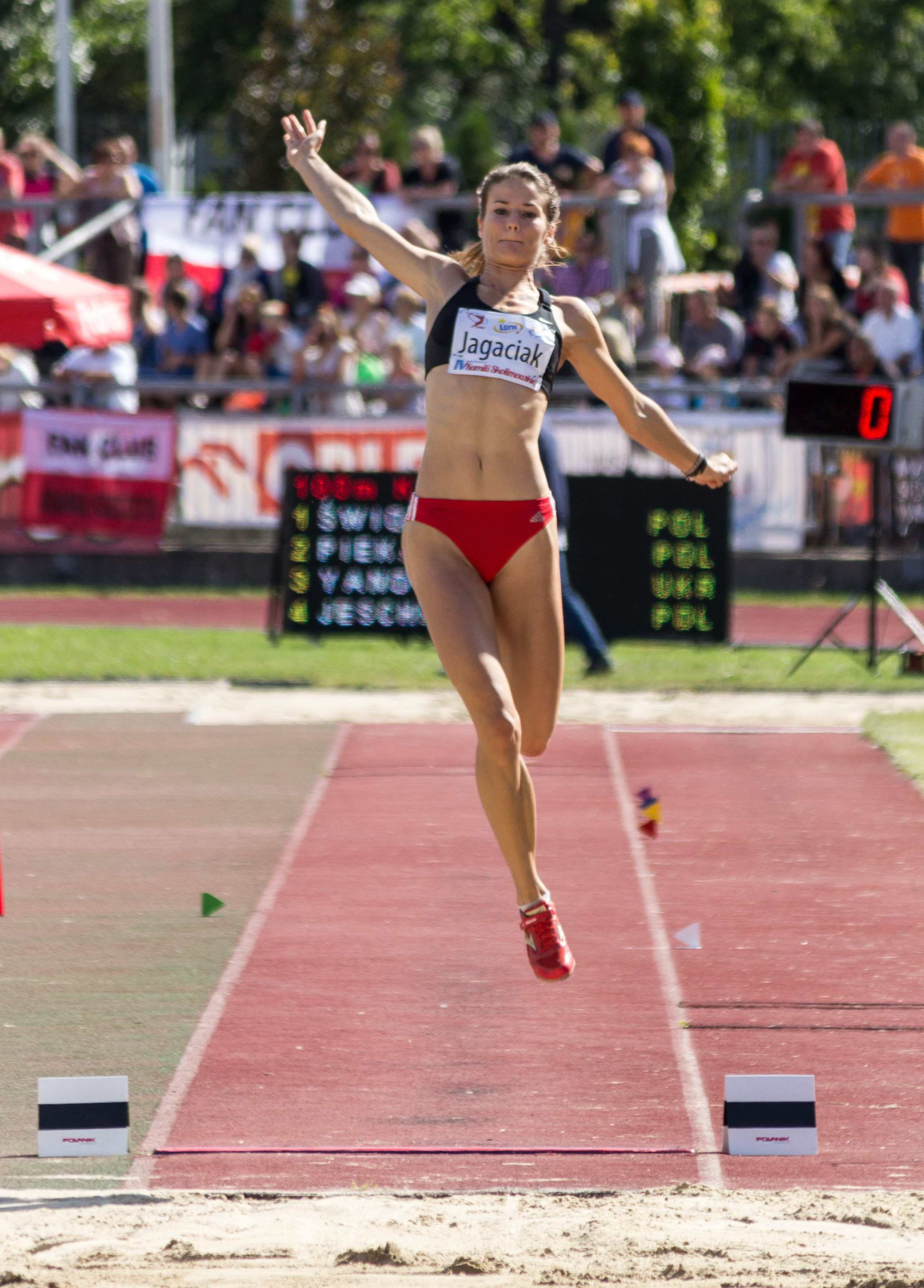 Memoriał Kamili Skolimowskiej w Warszawie, 2013-08-25